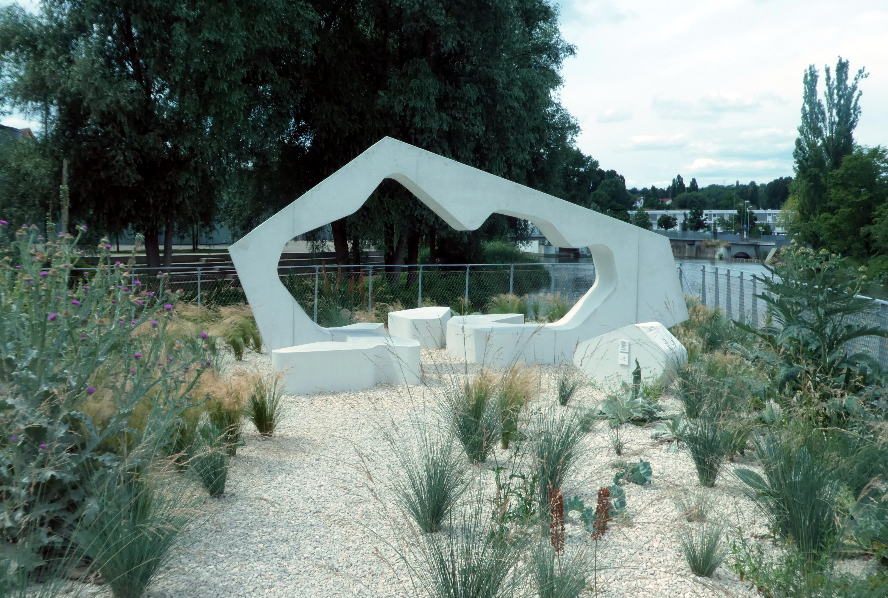 Waiblingen - "Weißes Haus". Die begehbare Skulptur entstand als Station 14 der "16 Stationen" der Remstal-Gartenschau 2019.